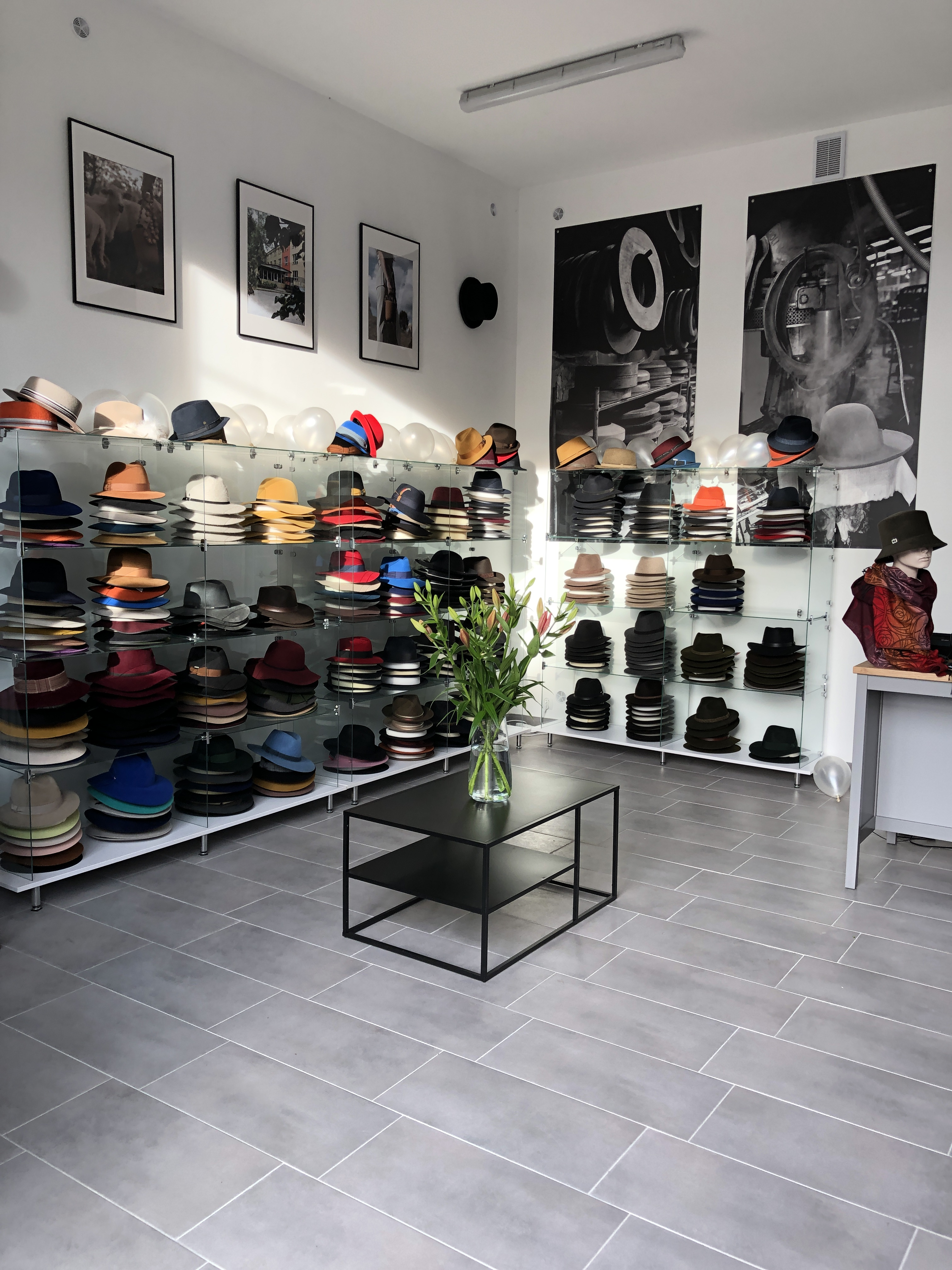 Sklep Firmowy POLKAP